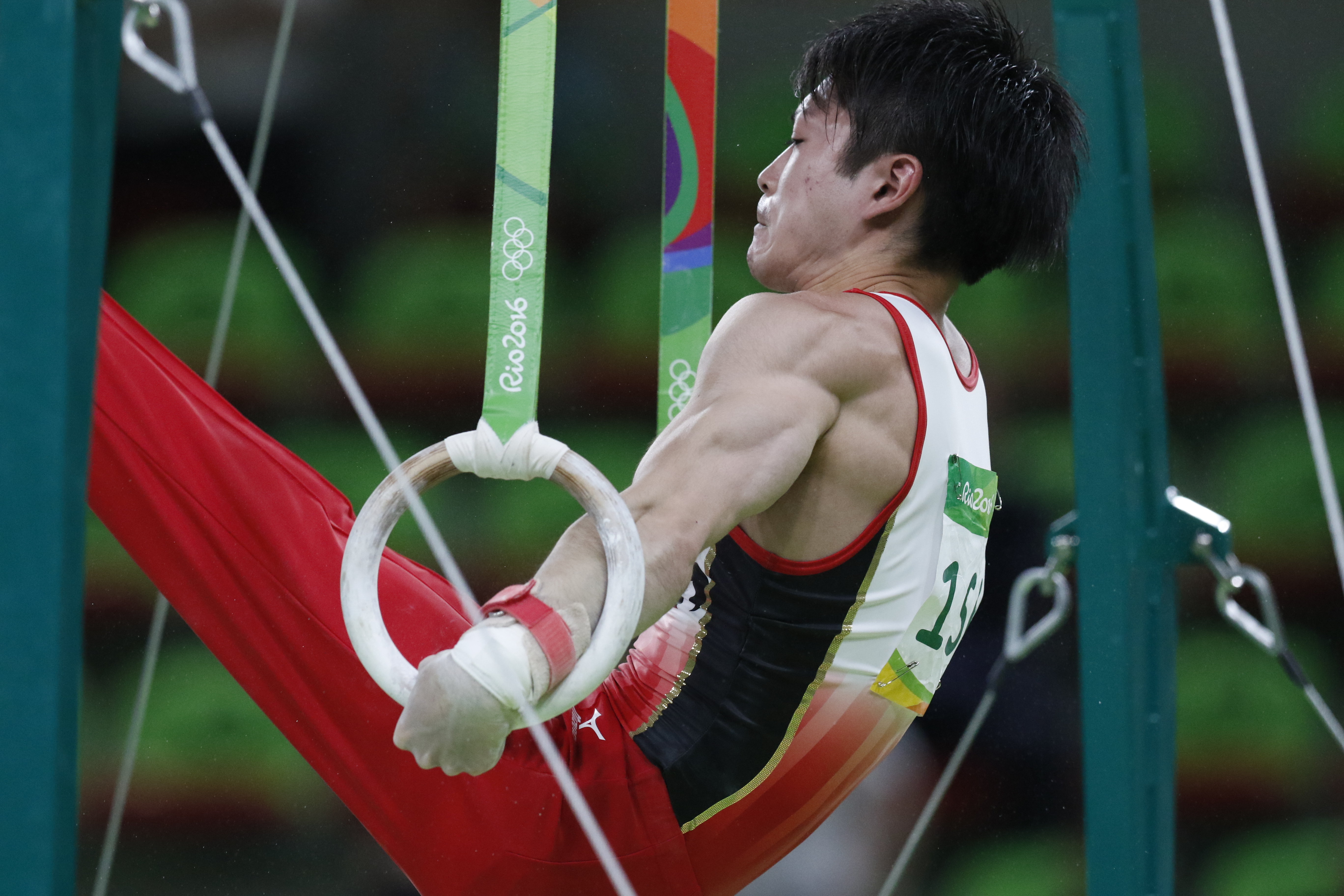 Rio de Janeiro - Kohei Uchimura durante exercício de solo em que o Japão levou medalha de ouro na ginástica artística por equipes no masculino nos Jogos Olímpicos Rio 2016 (Fernando Frazão/Agência Brasil)